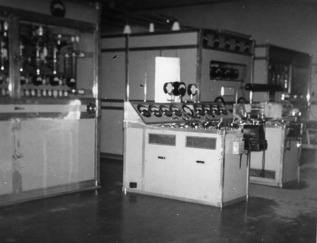 Kontrollbordet vid Spånga Rundradiostation. Foto: Johan Wihlander